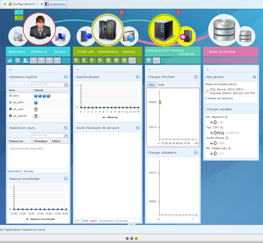 Consolde d'administration AppliDis